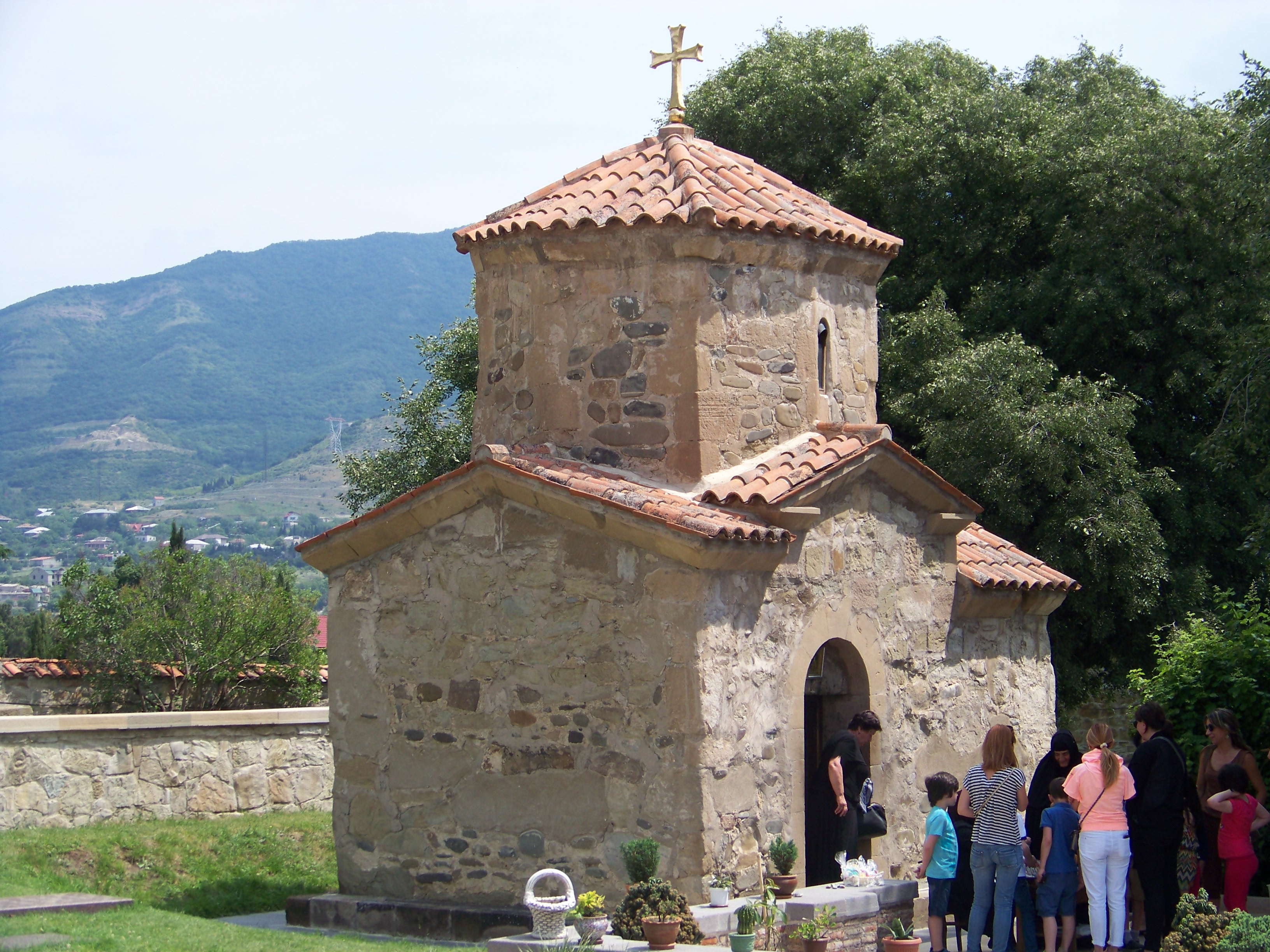 წმინდა ნინოს ეკლესია